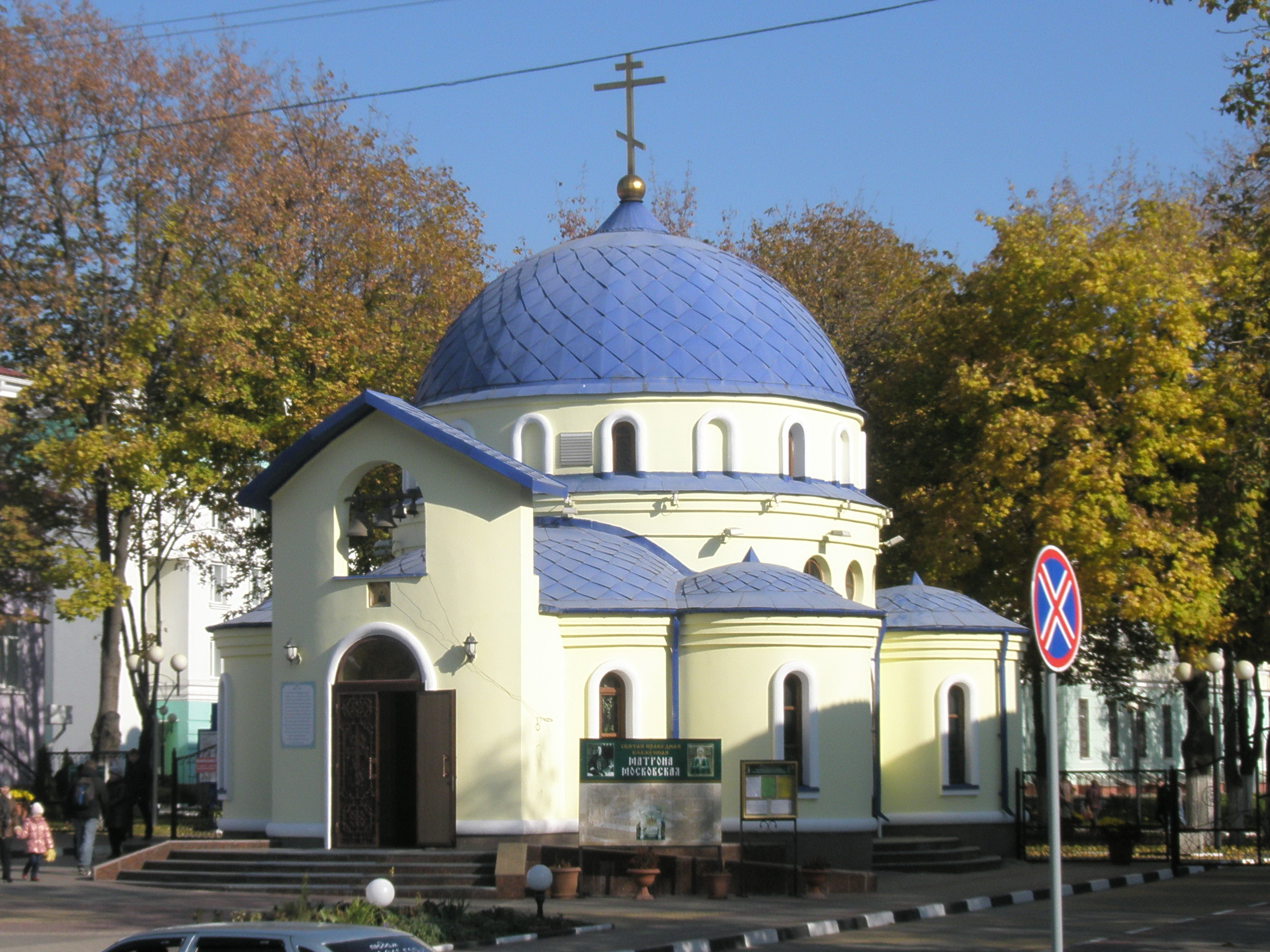 Храм блаженной Матроны Московской на территории Белгородской областной клинической больницы в городе Белгороде.